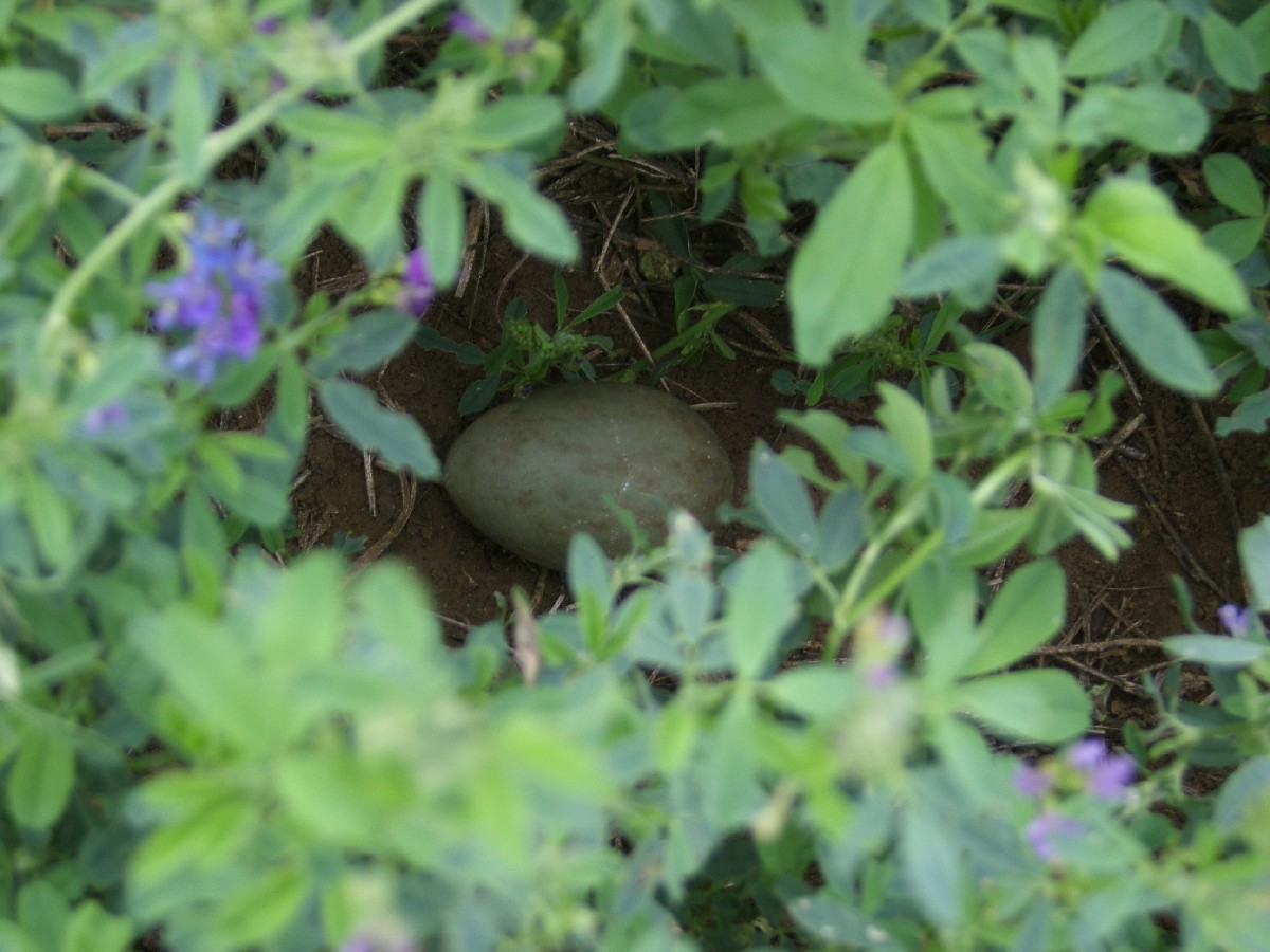 Tetrax tetrax eggs